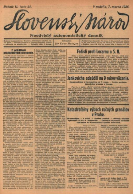 Titulný list denníka Slovenský národ, ktorý vychádzal v rokoch 1925 a 1926 v Bratislave.